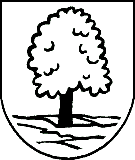 Herb Bielowicka w powiecie bielskim, gminie Jasienica